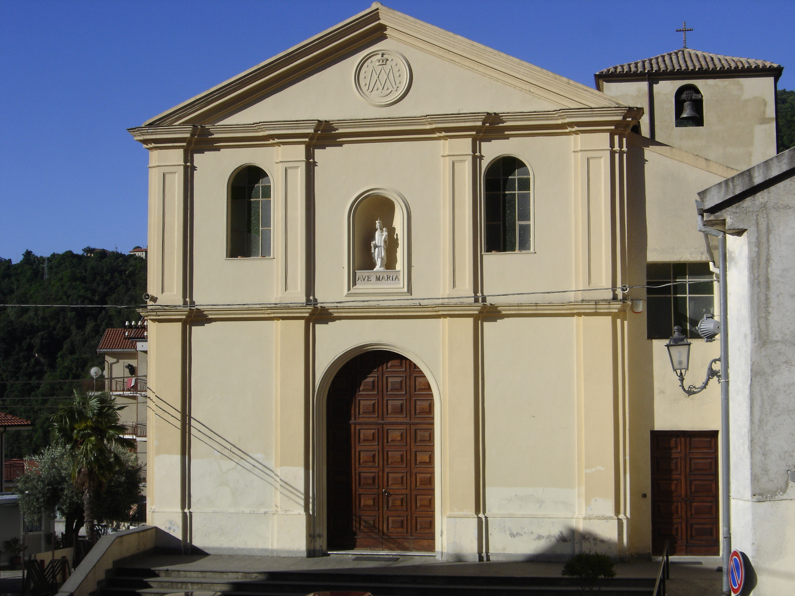 Facciata della chiesa di Santa Maria Maggiore, Taverna (CZ)